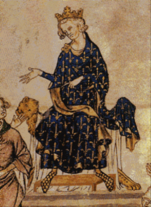 Philippe VI de Valois, détail de la miniature Le procès de Robert d'Artois (vers 1336), Bibliothèque nationale de France, manuscrit Français 18437, folio 2 [1].